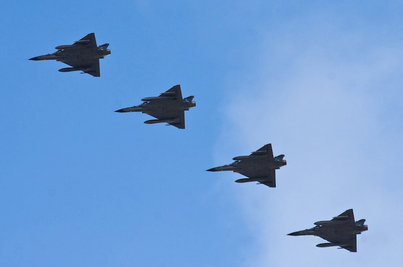 Aviões no ar durante a Cruzex IV 2008 em Natal, Rio Grande do Norte, Brasil.